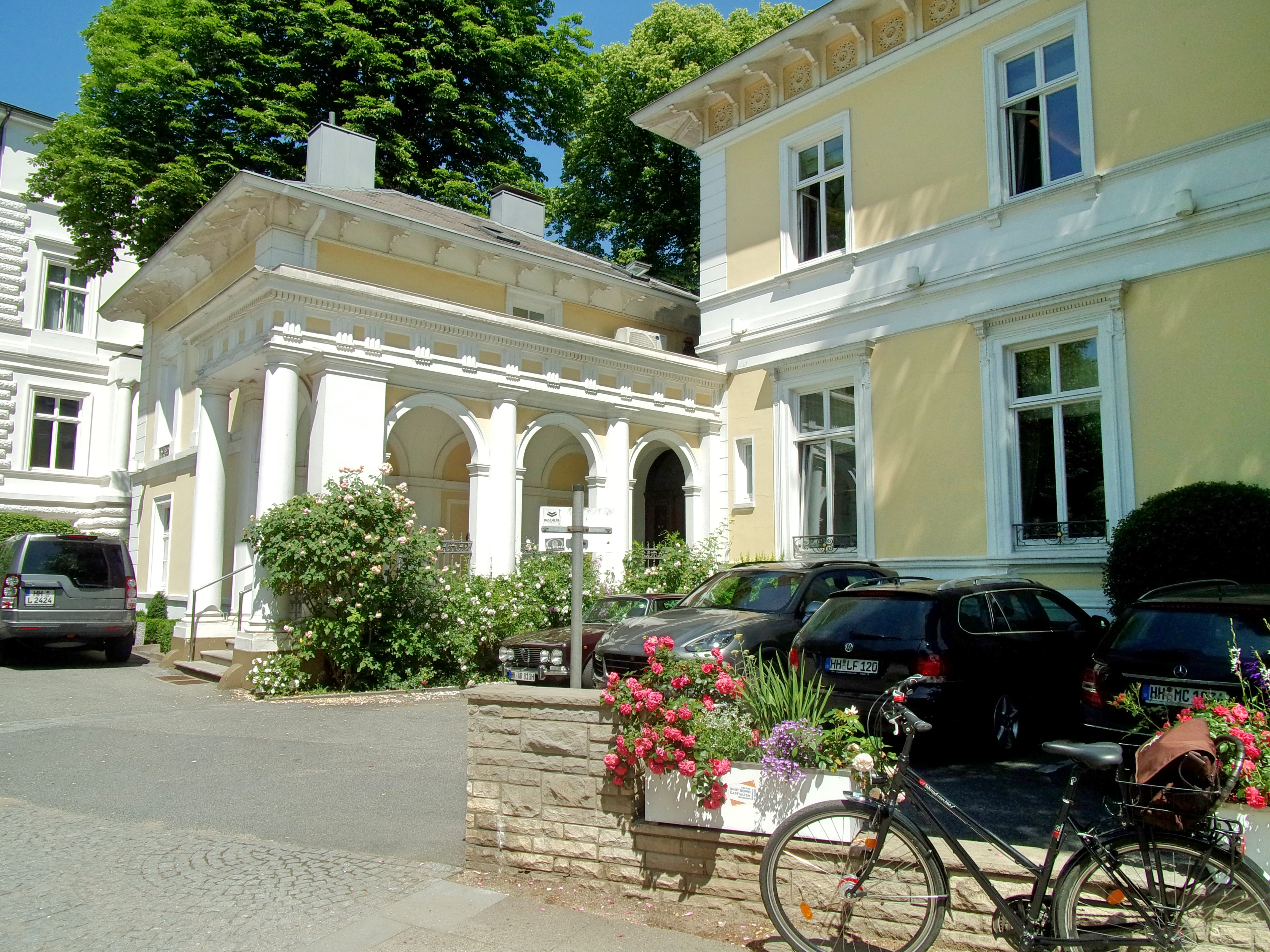 Der Anglo-German Club am Harvestehuder Weg 44. Der Club wurde gegründet, um die Deutsch-Britischen Beziehungen besonders nach dem 2. Weltkrieg wieder auf eine freundschaftliche Basis zu stellen und zu intensivieren. Der Club bezeichnet sich selbst als unpolitisch. Das Gebäude des Clubs befindet sich direkt an der Alster und wurde 1860 ursprünglich als Wohnhaus für die Familie Bielenberg von Martin Haller erbaut. Mehr zum Gebäude unter folgendem Link: This is a photograph of an architectural monument.